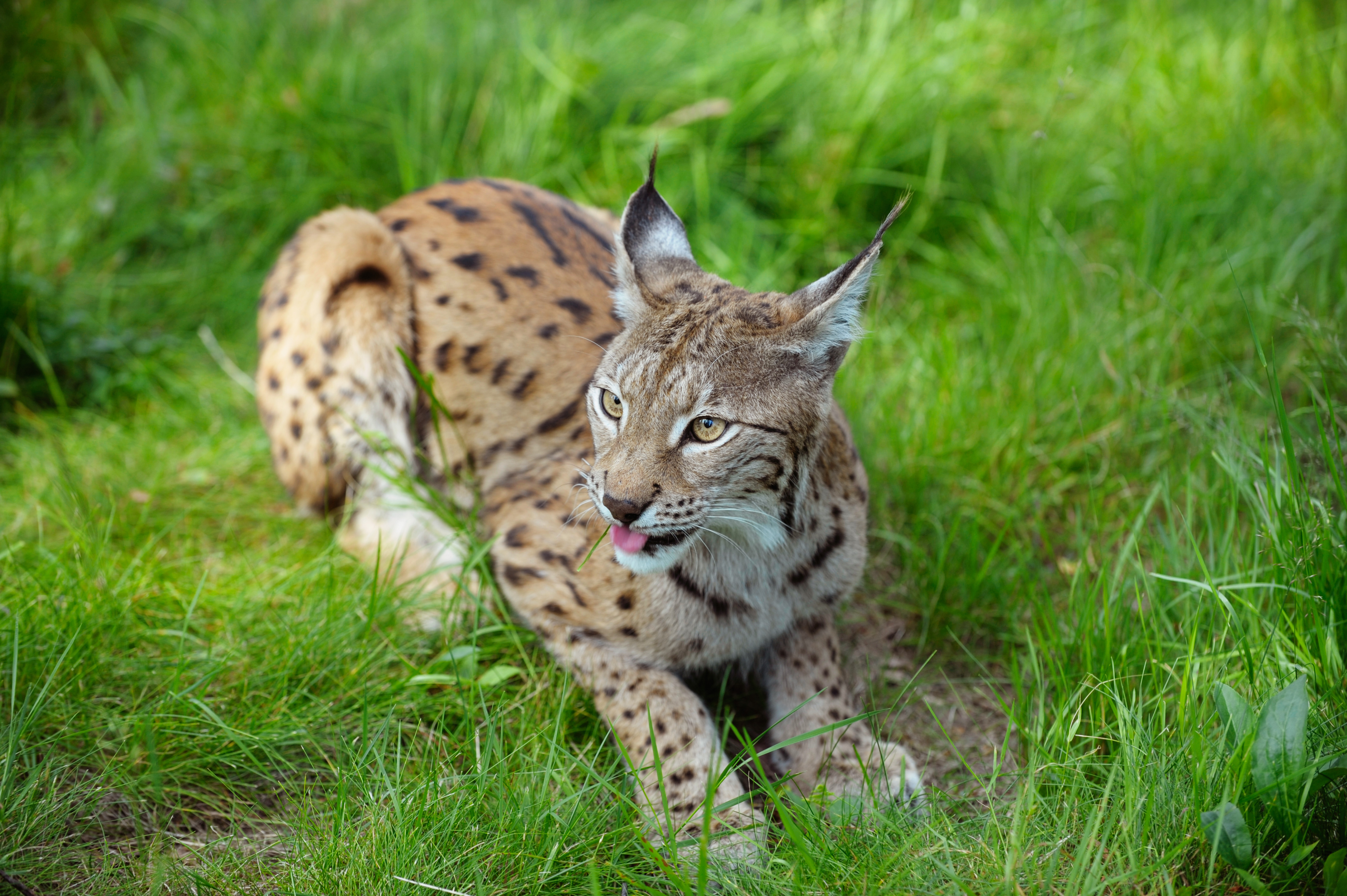 Lodjur fotograferad på Polar Zoo Norge